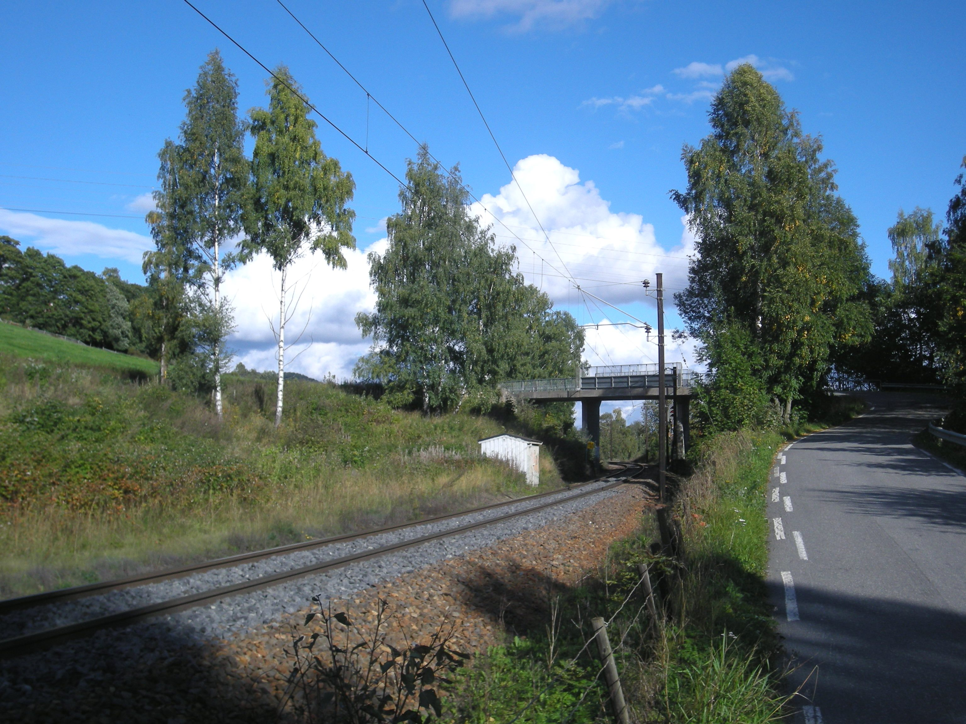 Tandevegen (fylkesvei 1788, tidl. fylkesvei 96 og før det fylkesvei 28) nær nedlagte Ringsaker stasjon